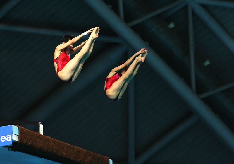 女子双人十米台世界杯比赛